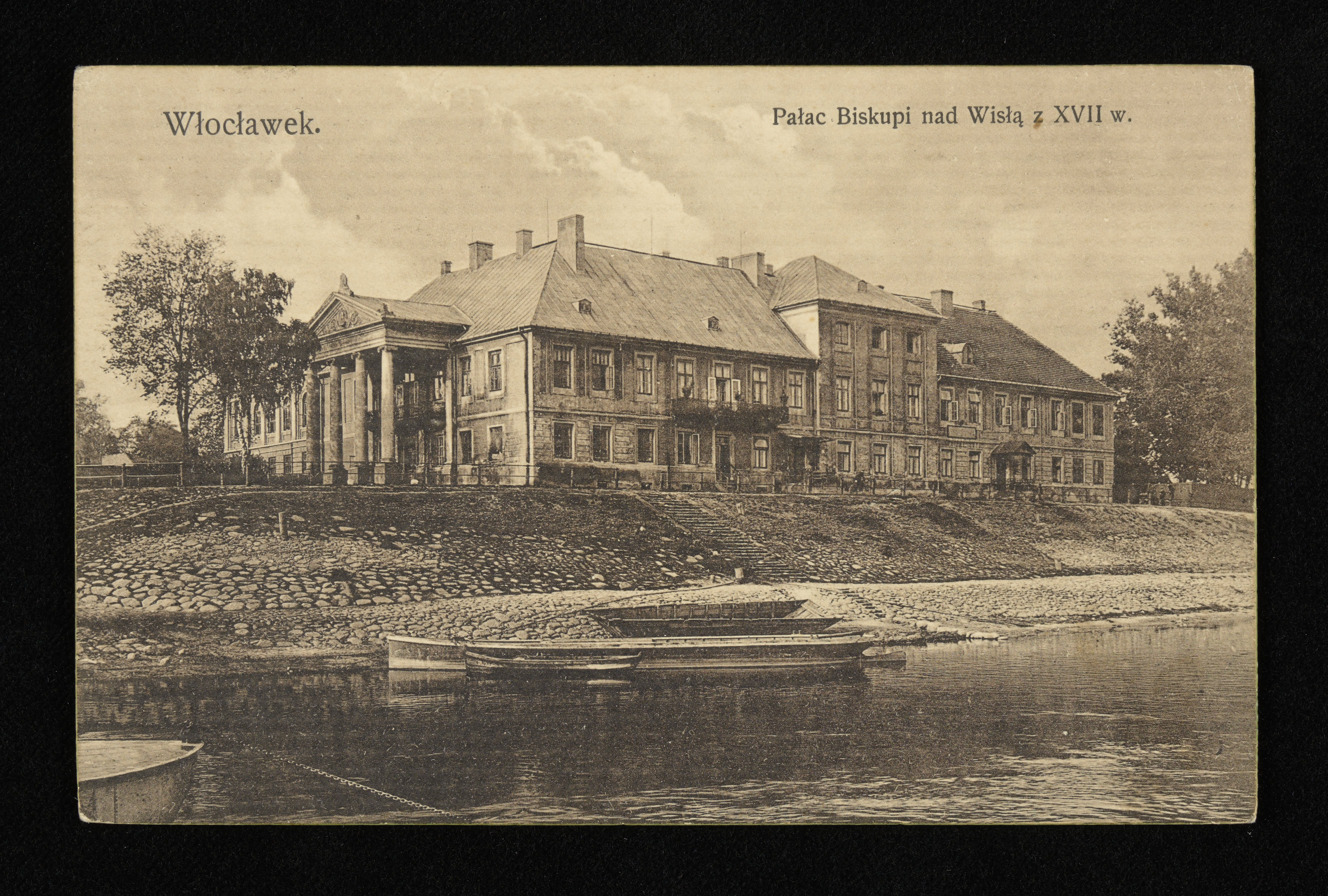 Włocławek : pałac biskupi nad Wisłą z XVII w